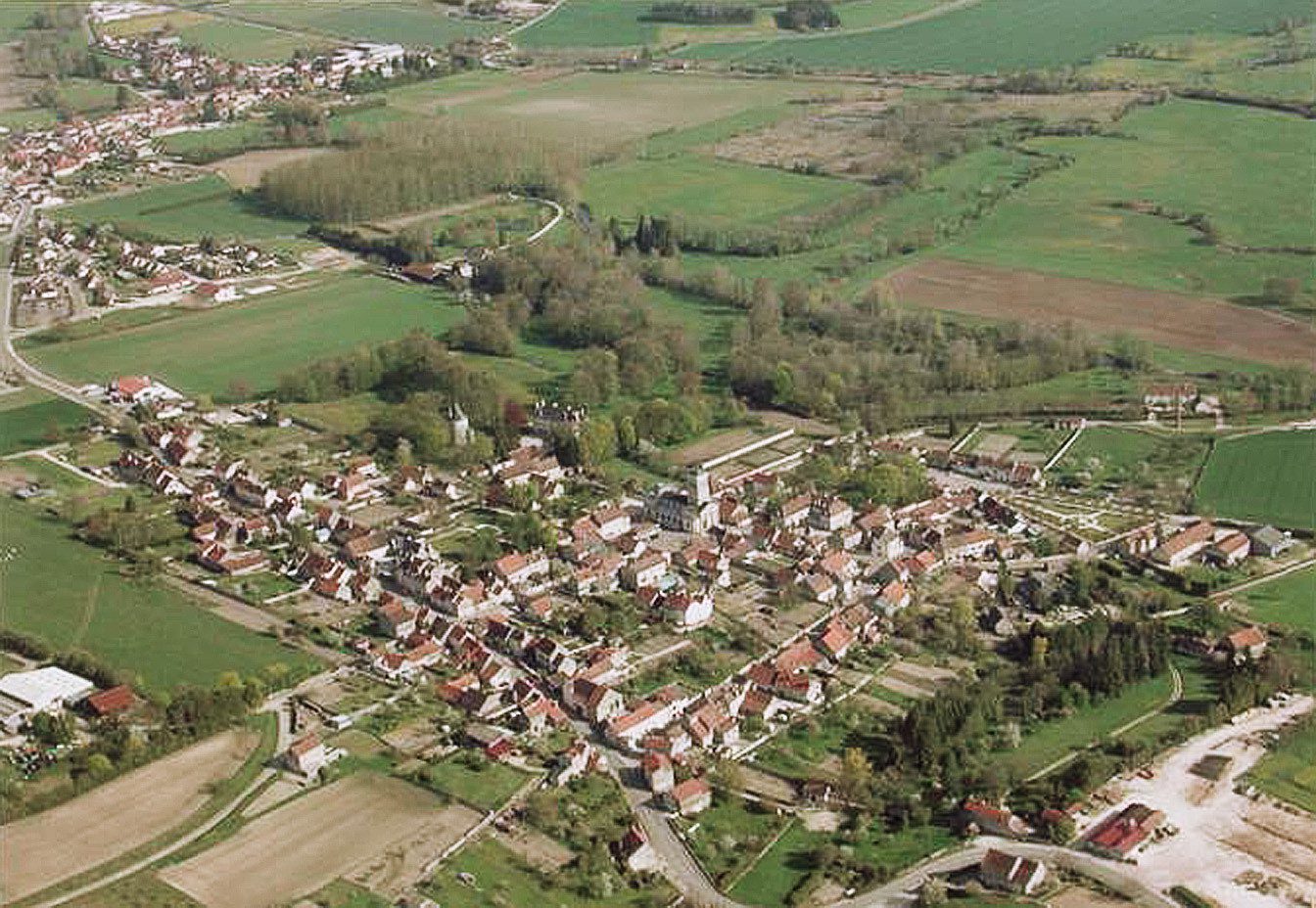 Photo aérienne de Voulaines